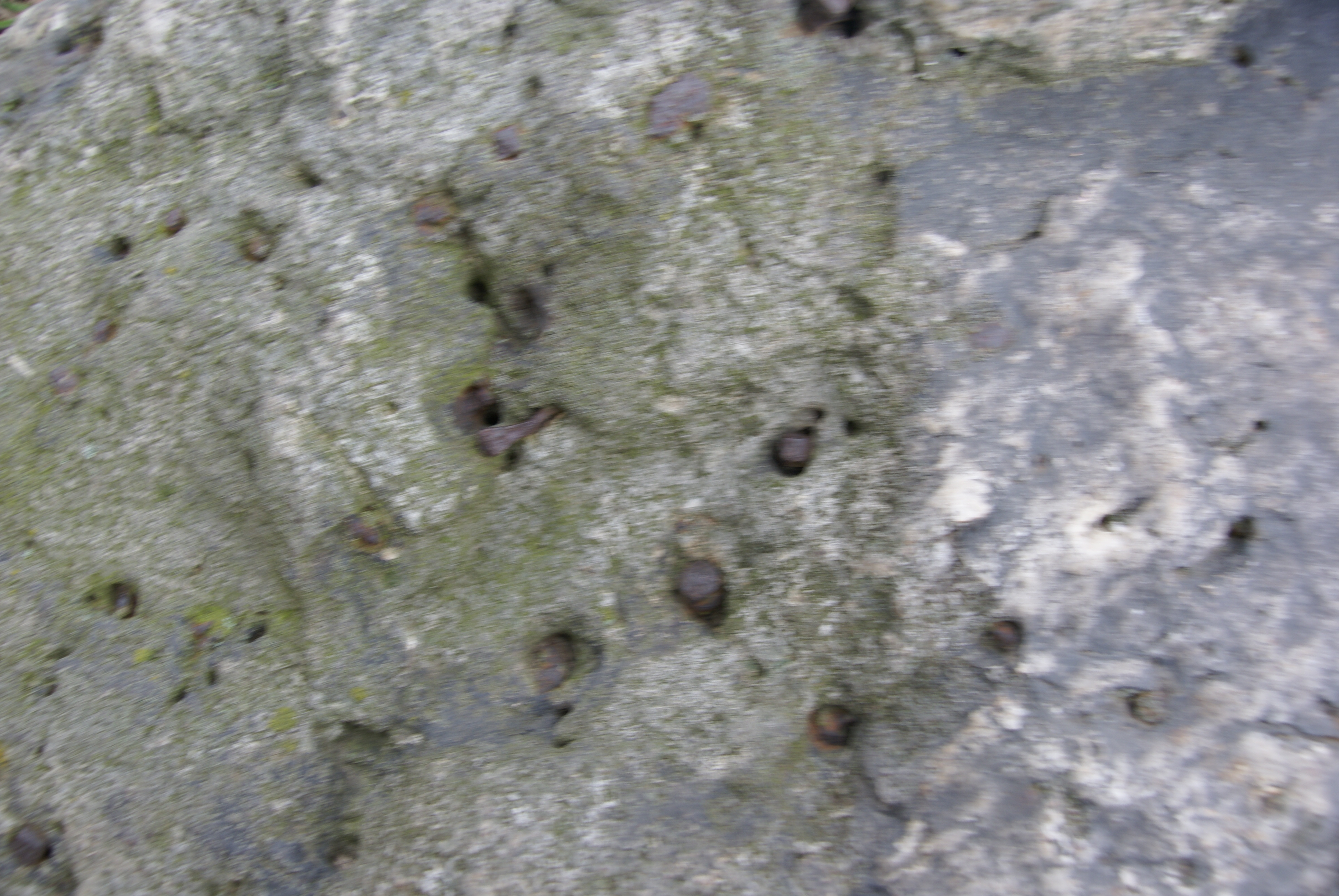 Nägel in einem Viererstein bei Krimpe